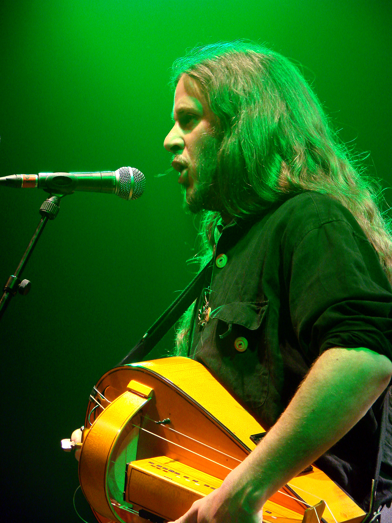 Stille Volk au Cernunnos Fest 07, le 16/12/07 à la Locomotive, Paris. Stille Volk est un groupe néo-médiéval folk originaire des Pyrénées. Patrick Lafforgue.